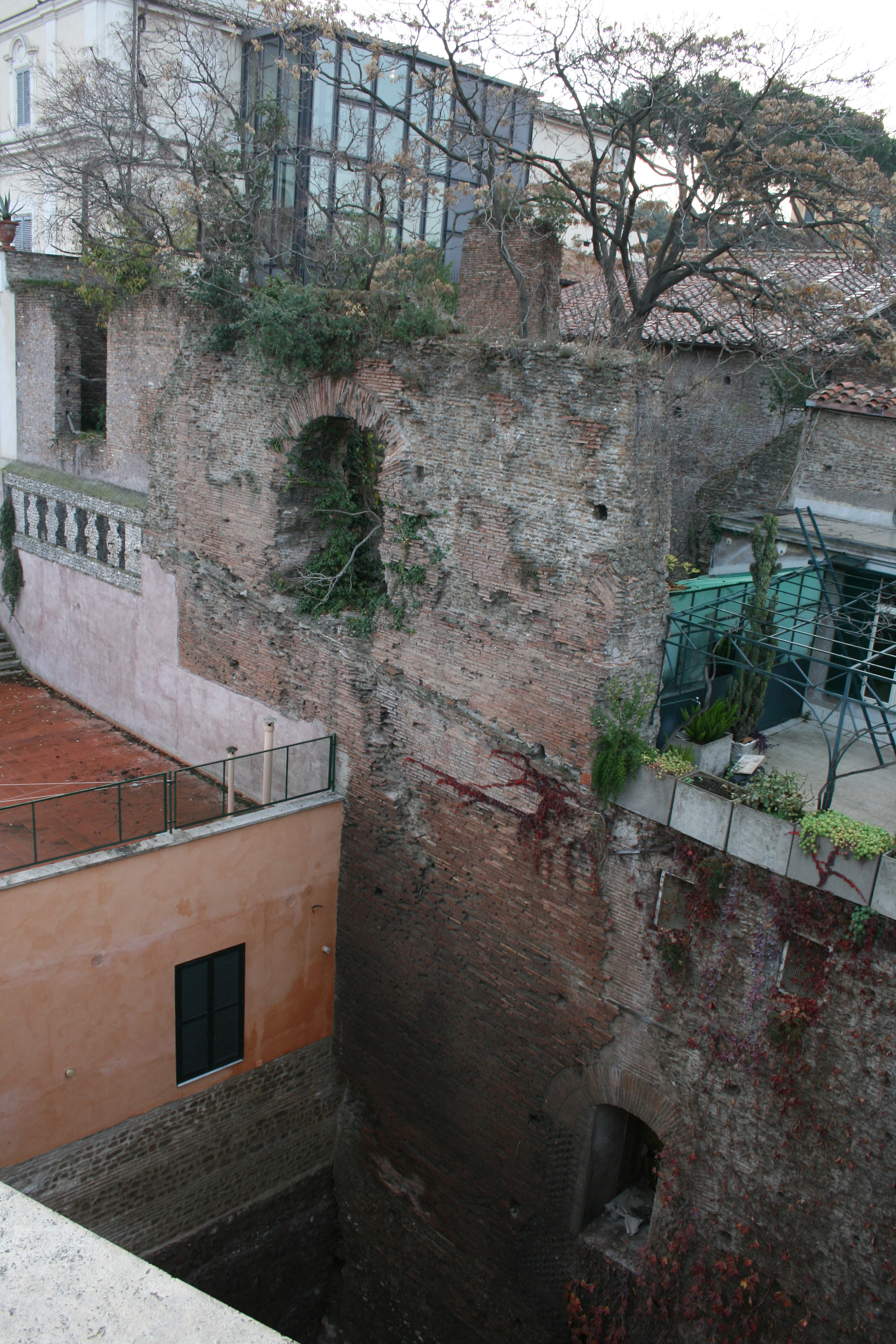 Ruderi del Tempio di Serapide a Roma alle pendici del colle del Quirinale